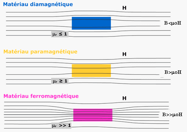 Il s'agit d'une représentation graphique du champ (H) et de l'induction (B) magnétique qui devrait permettre une meilleure compréhension des caractéristiques des différents matériaux. L'auteur de l'image originale est User:Marled. Correction : B et H ne sont pas des quantités directement comparables car de dimensions différentes. A droite du schéma lire B signe de comparaison μ0H. RIGNON Michel (talk) 03:08, 24 January 2011 (UTC)